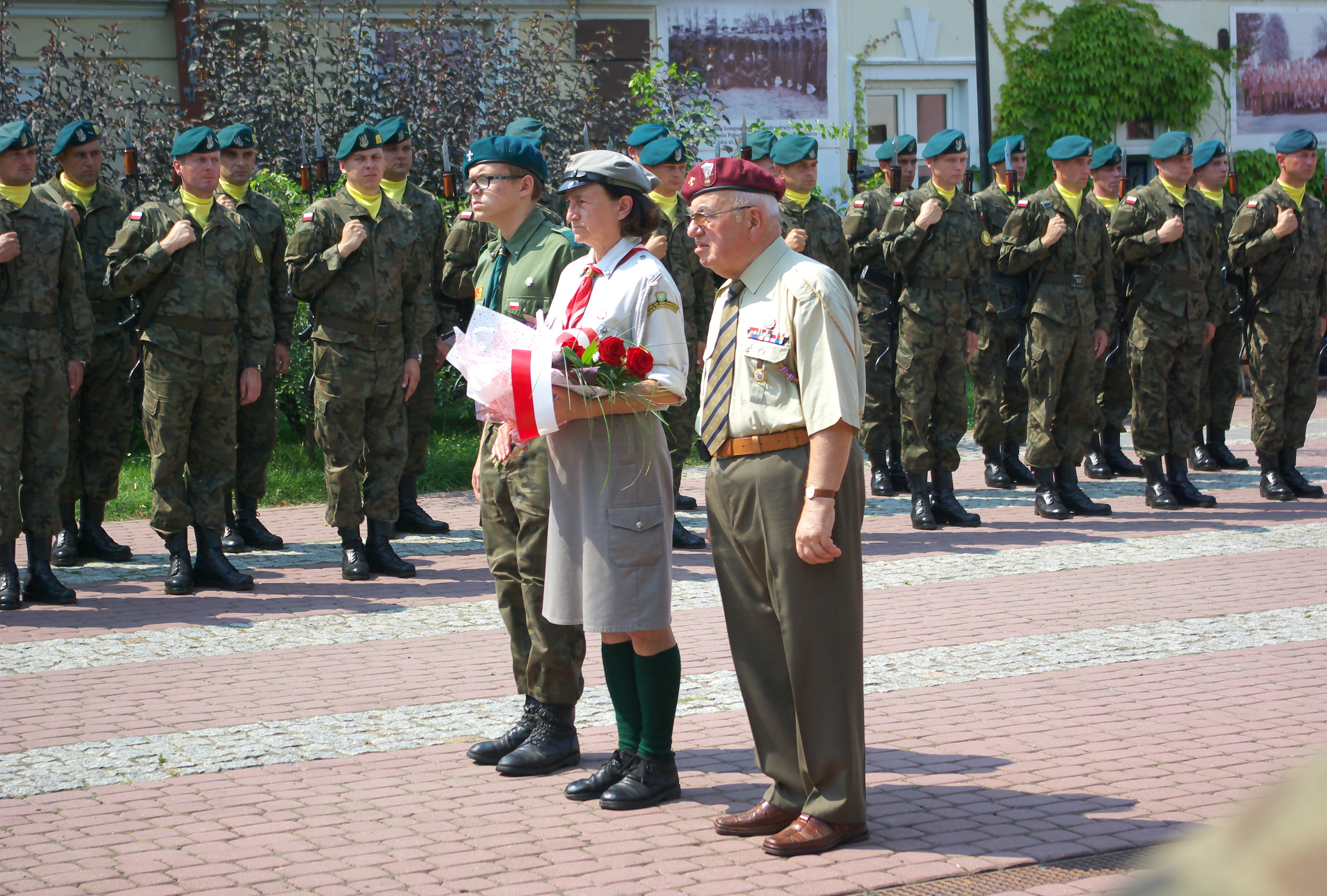 Obchody Święta Wojska Polskiego w dniu 13 sierpnia 2015 w Sanoku. Działacze sanockiego hufca, hm Jerzy Kwaśniewicz i hm Krystyna Chowaniec